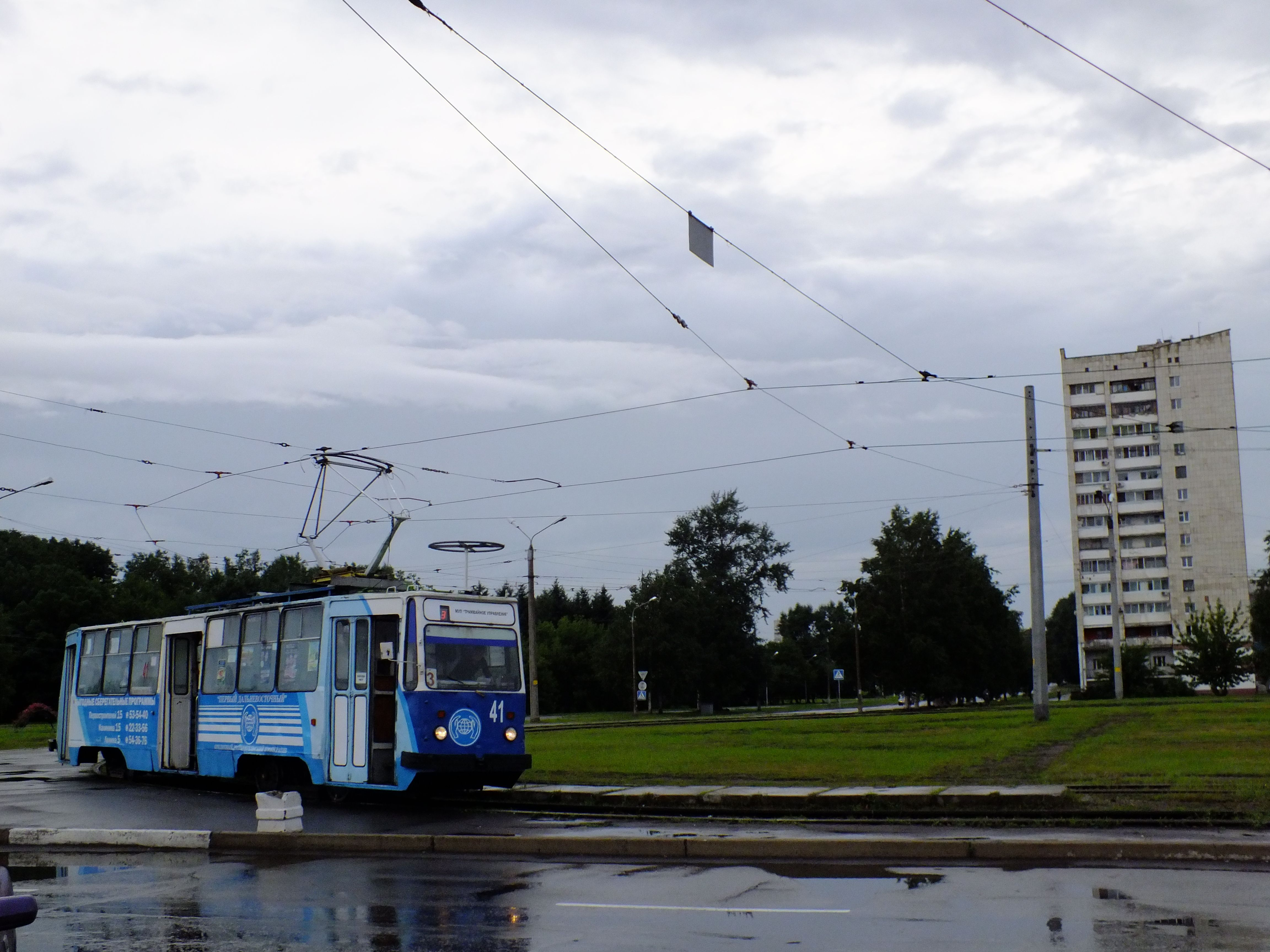 Trams in Komsomolsk-on-Amur